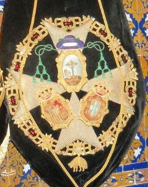 Estandarte corporativo donde aparece el escudo de la Hermandad